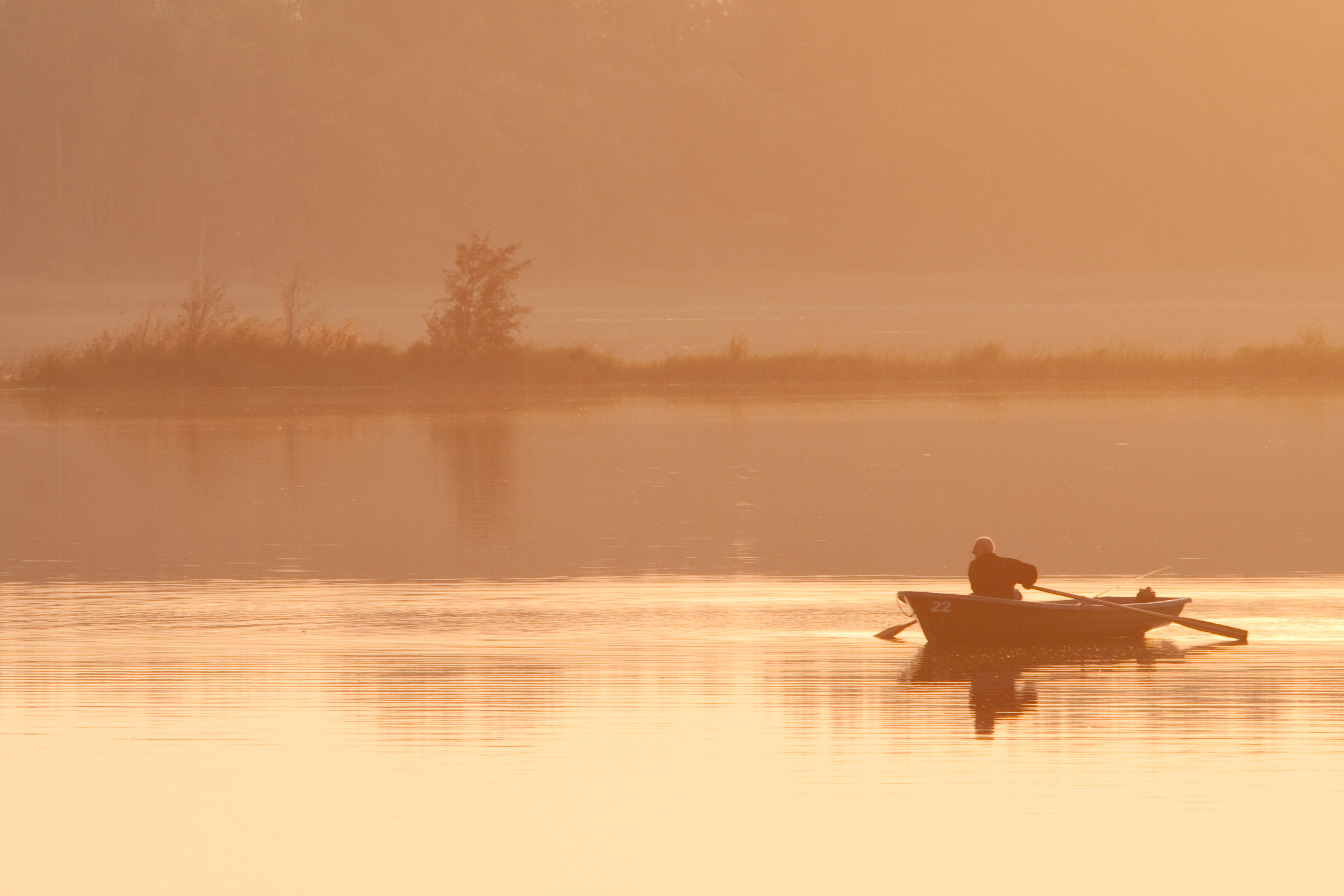 Harjumaa